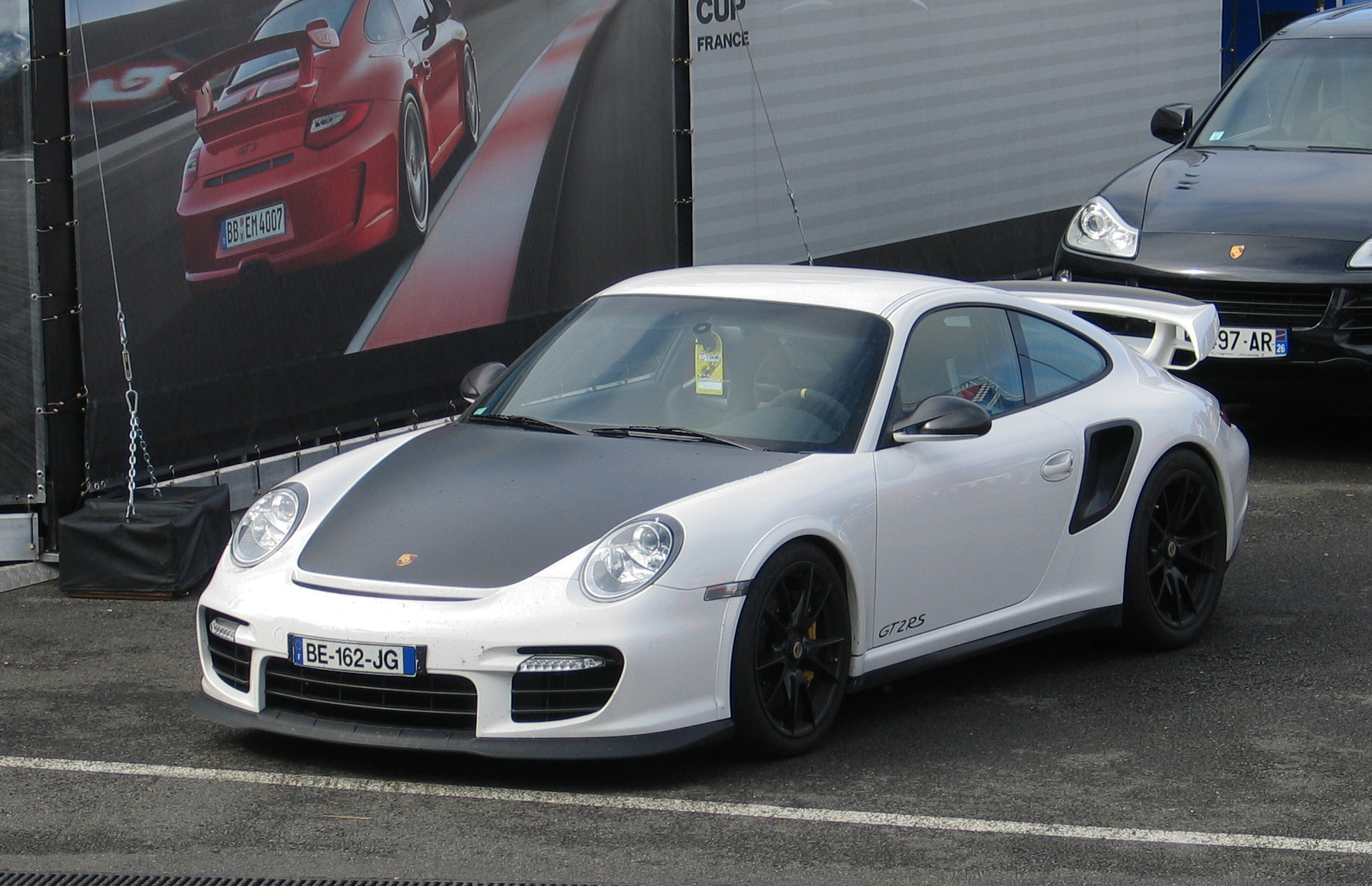 Type 997 gen 2 239 589€ 620cv à 6500 700N.m à 2250 1370 kg Vitesse maximale : 330 km/h 0-100 km/h : 3,5 s